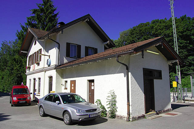 Eschenlohe: Bahnhof